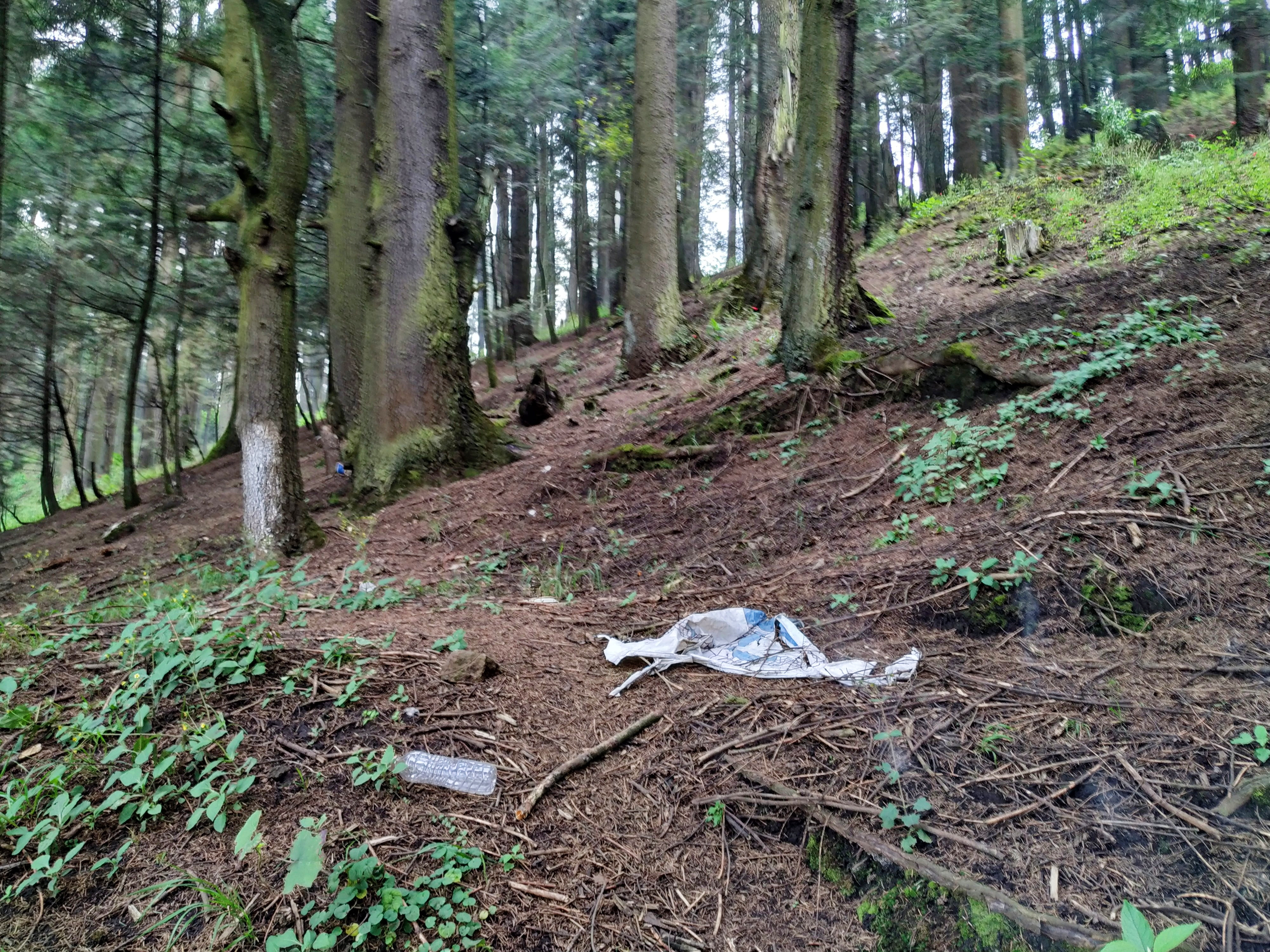 Basuraleza en La Marquesa, CDMX